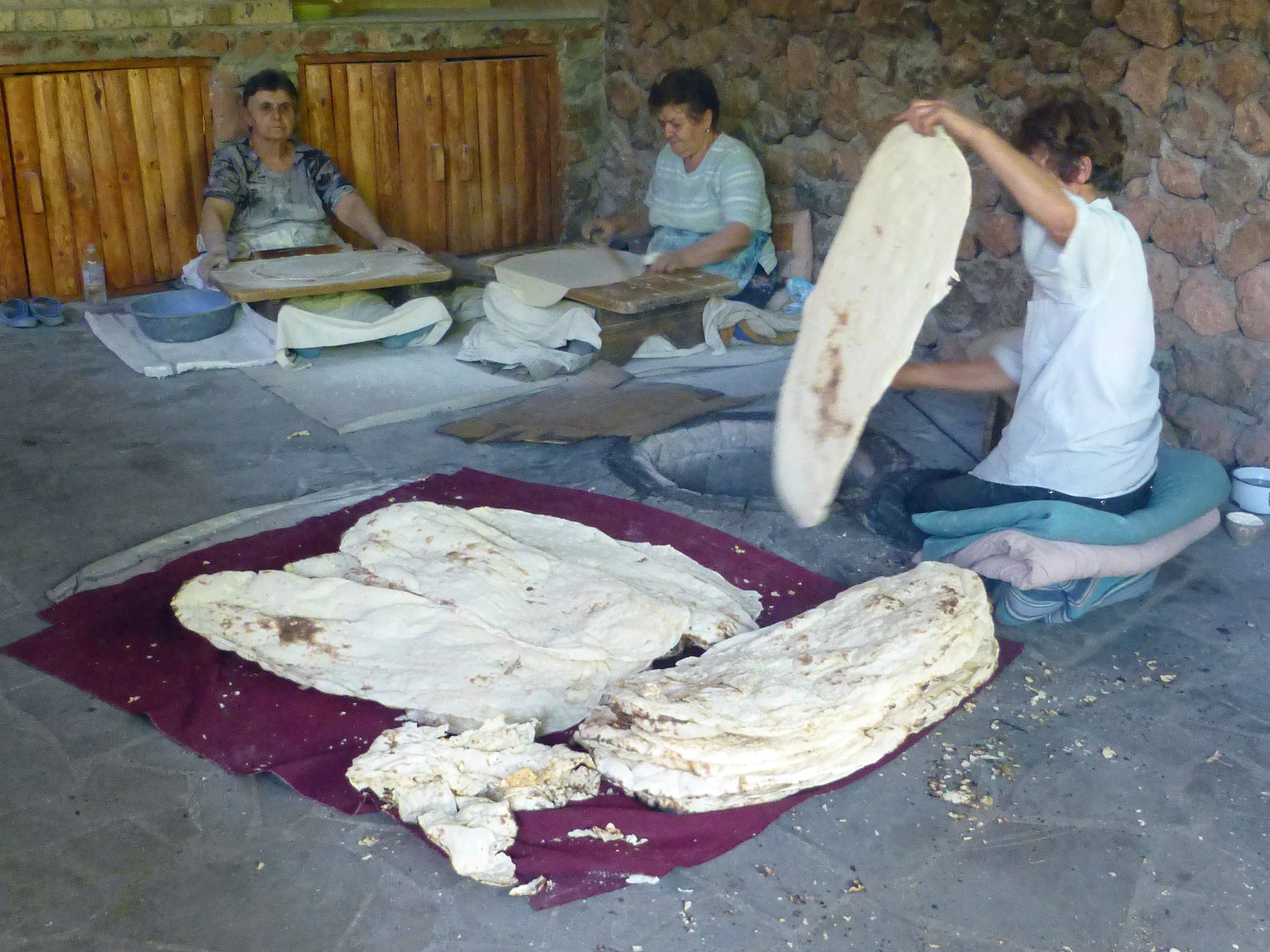 Fabrication du lavash à proximité du monastère de Noravank (Arménie).